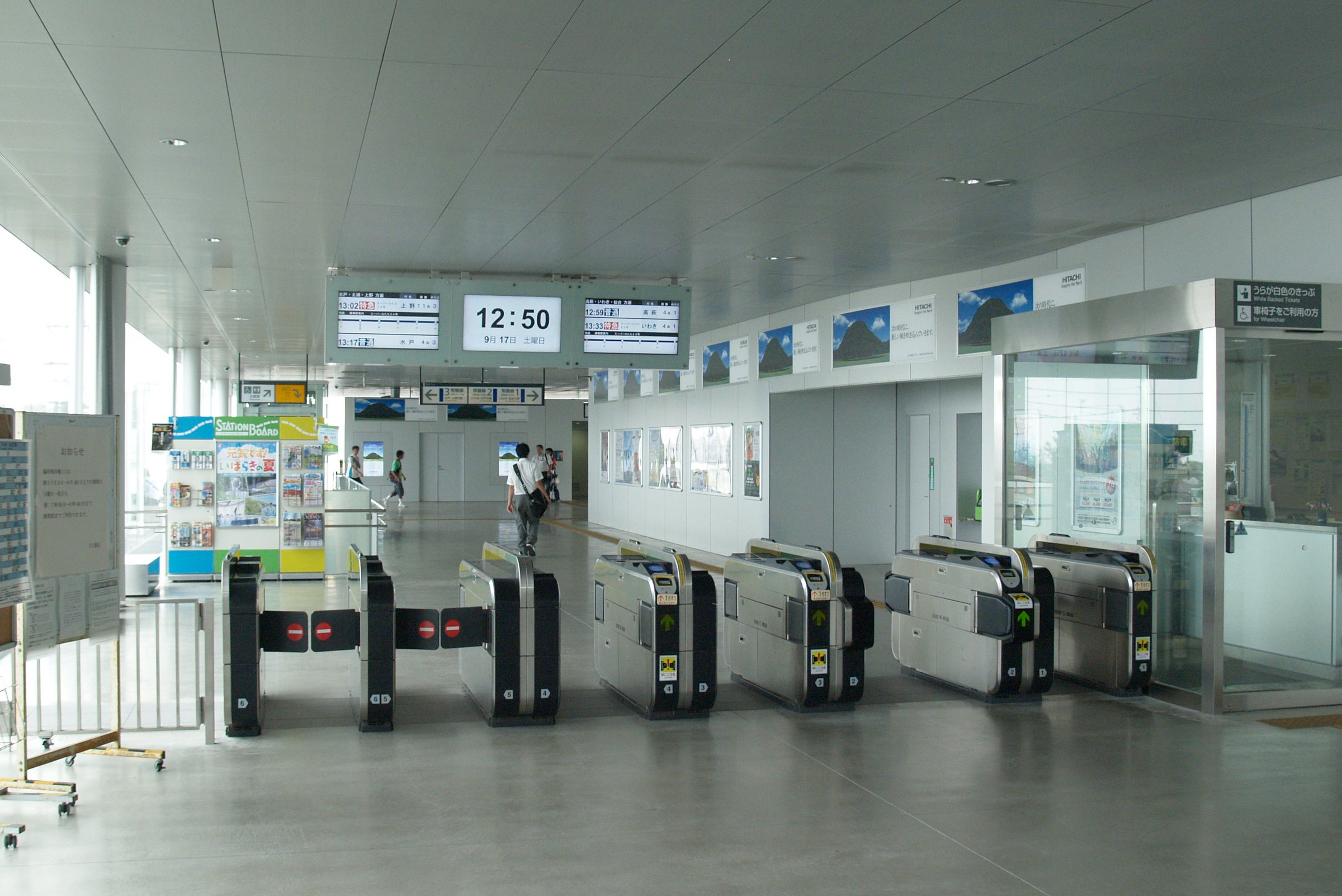 日立駅改札口